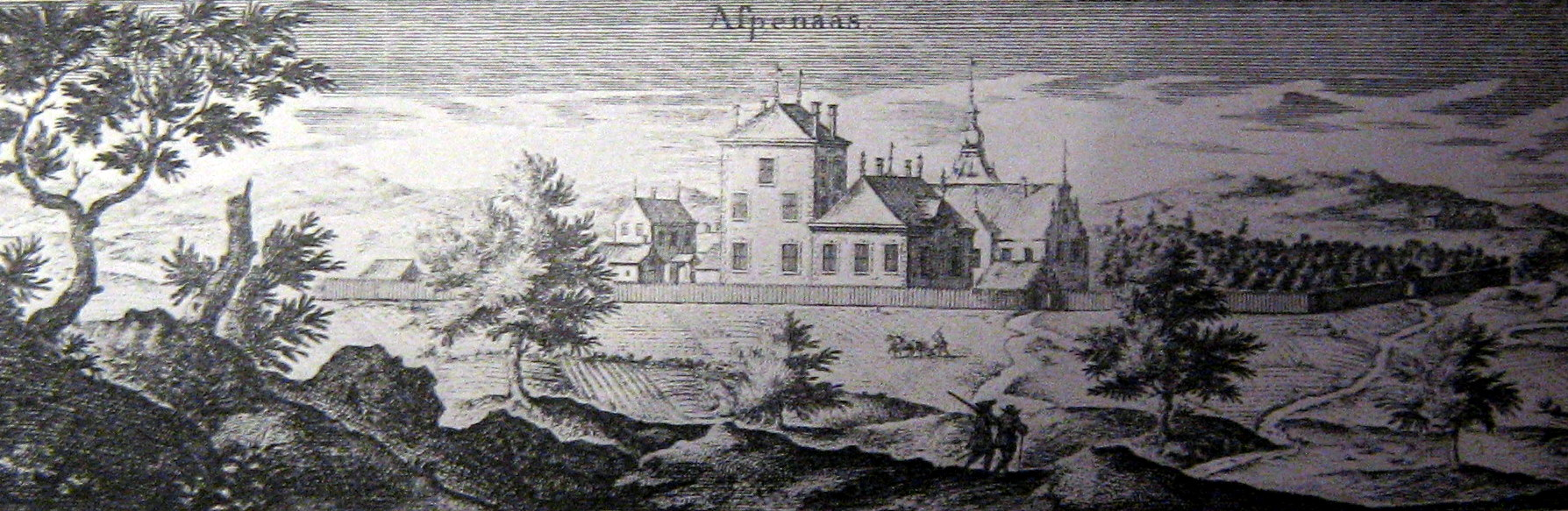 Aspnäs gård, Östervåla socken ur Suecia antiqua et hodierna (ur 1935 års faksimilutgåva)